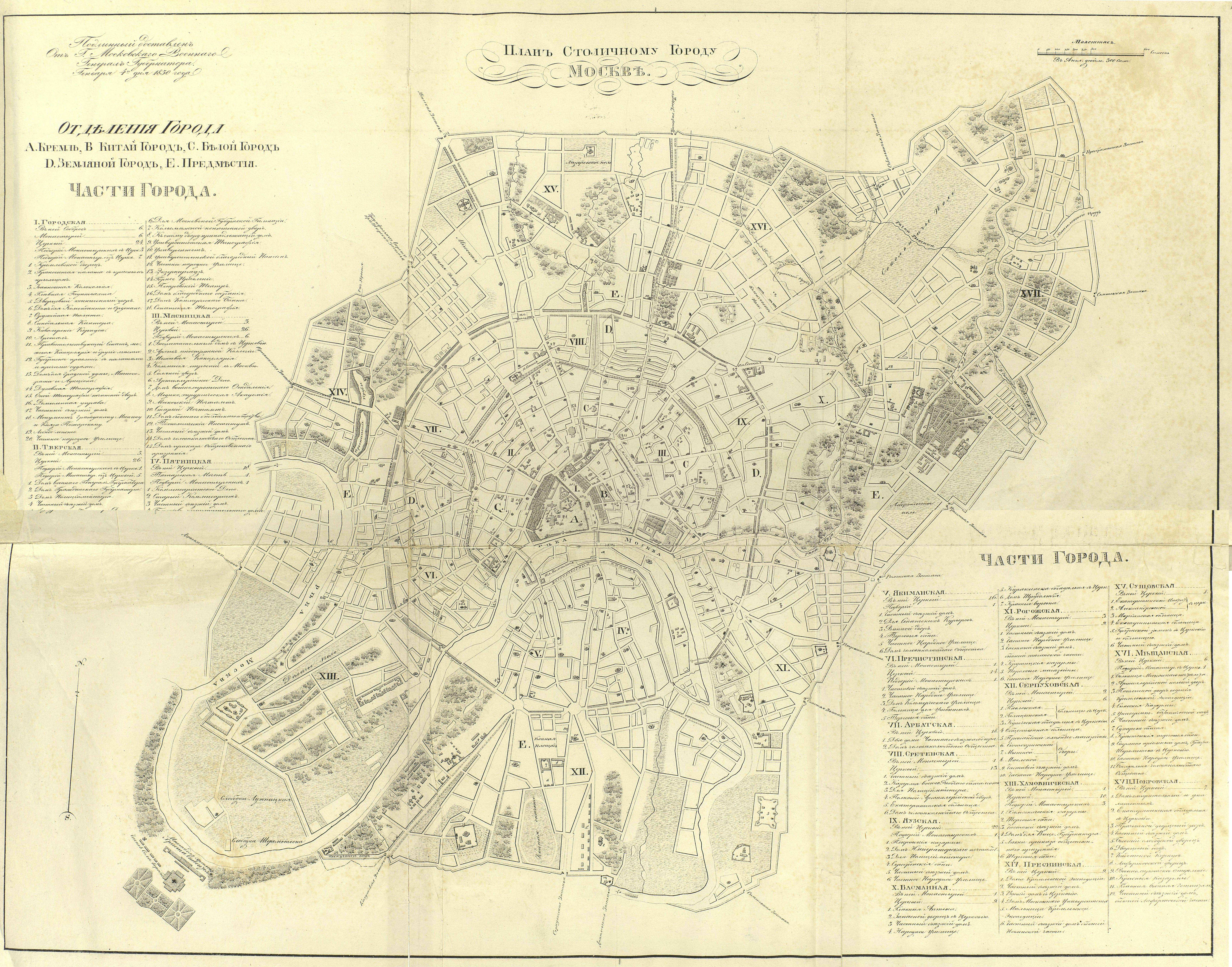 Полное Собрание Законов Российской Империи. Собрание первое. Книга чертежей и рисунков. (Планы городов).; 1839, Санктпетербургъ, Въ Типографіи II Отделенія Собственной Е. И. В. Канцеляріи.